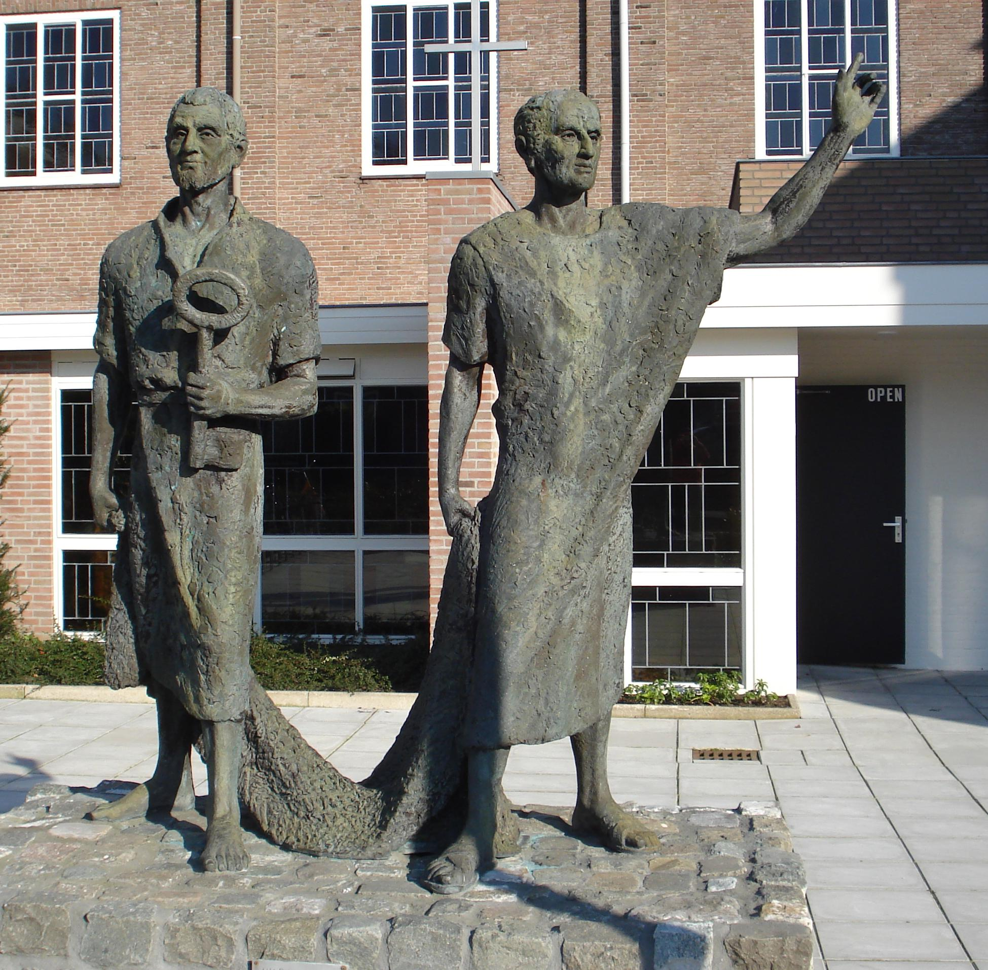 Soest, Steenhoffstraat. Kunstwerk "Heilige Petrus en Paulus" van zr.Marie-José van der Lee. Soest/The Netherlands. FOP.